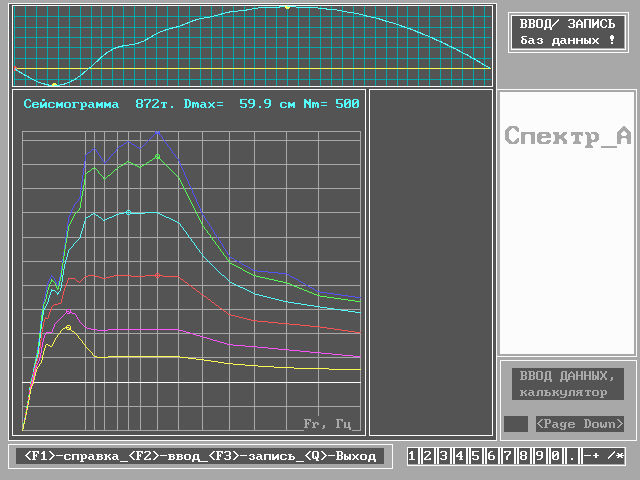 Графики производной сейсмограммы от СА-482 и ее спектры ответа